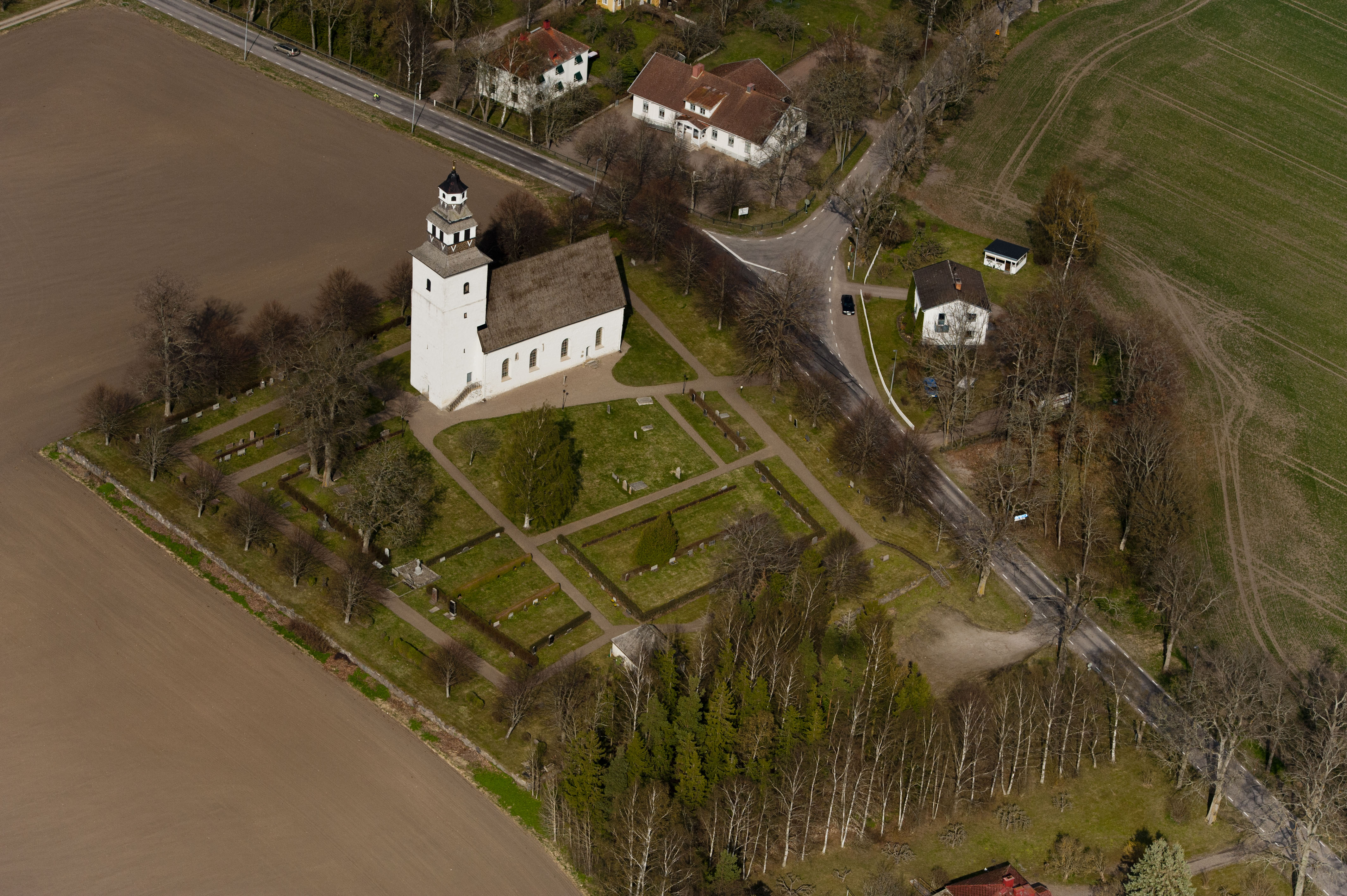 Hovs ka